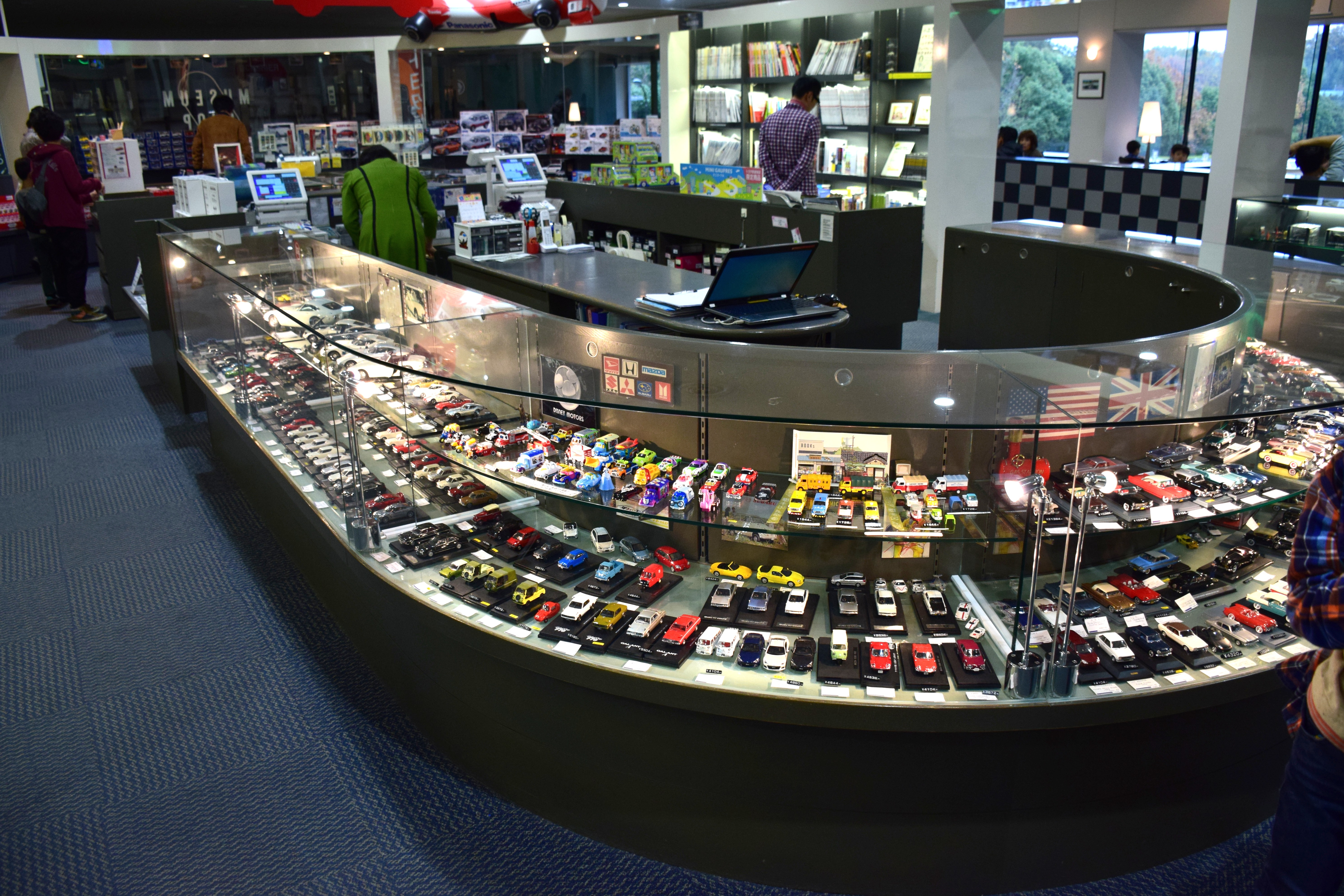 トヨタ博物館のミュージアムショップ